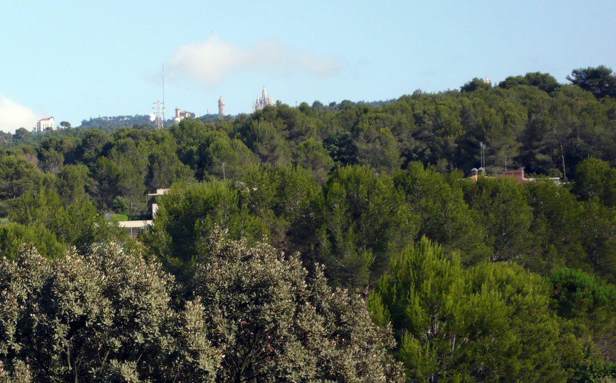 Sierra de la Collserola desde San Cugat